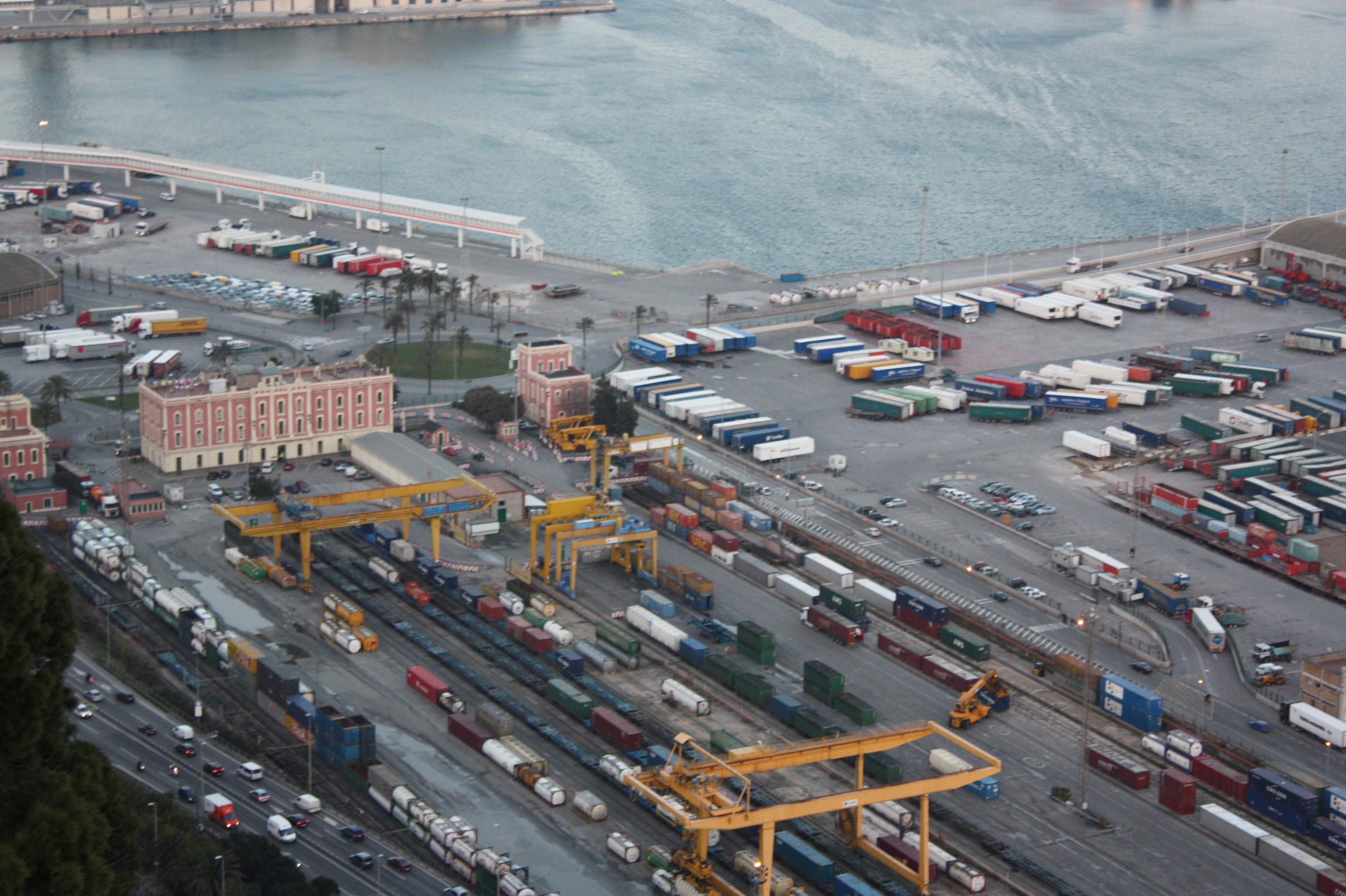 Estació de mercaderies del Morrot al Port de Barcelona, Barcelona.